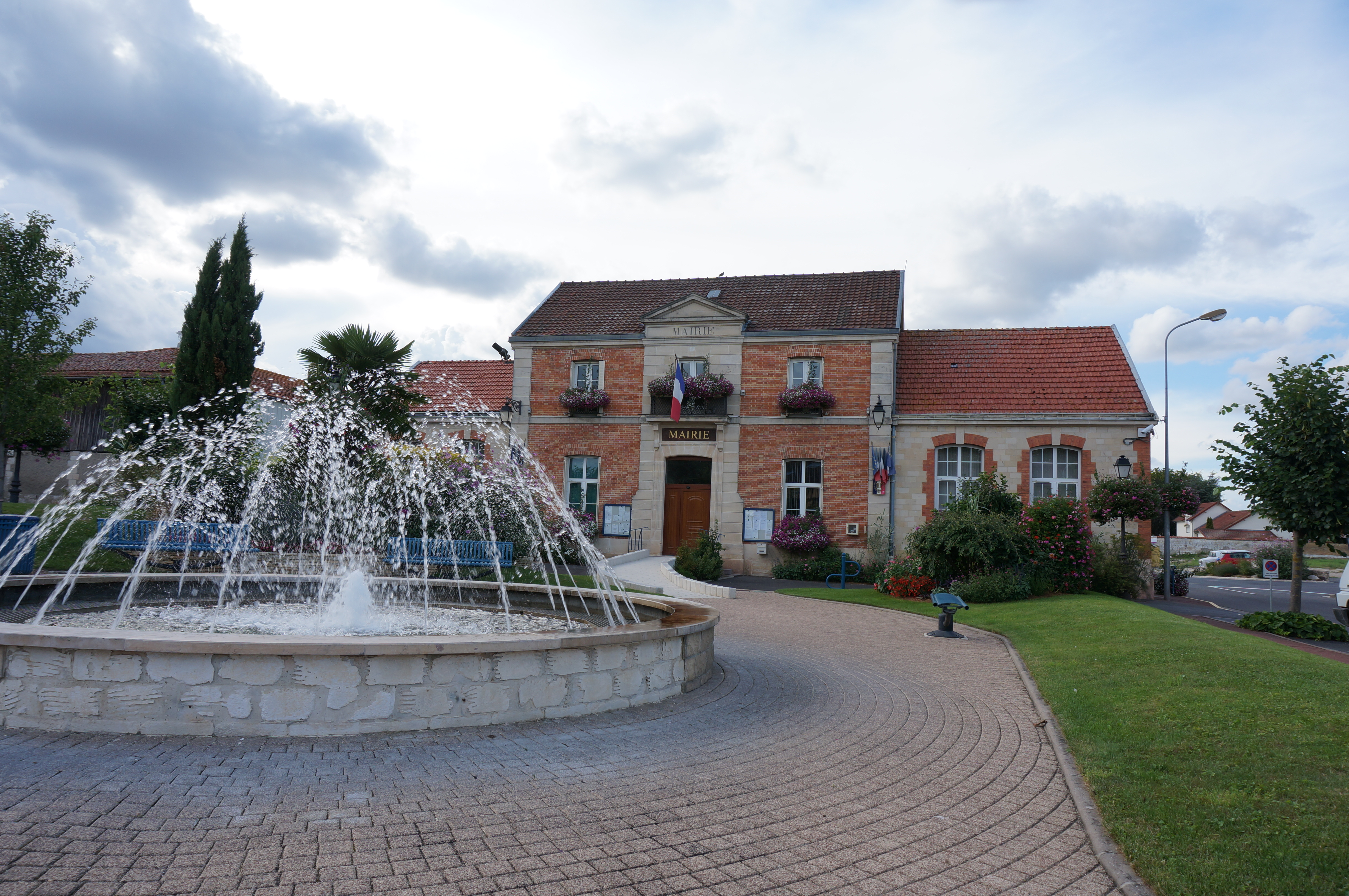 La Mairie de st martin sur Pré.